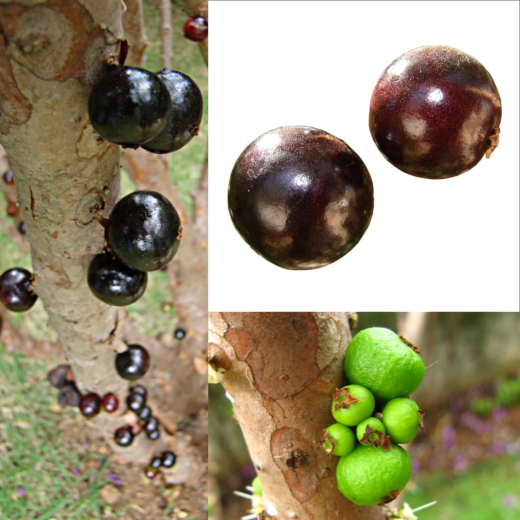 Grafika podręcznika Wikijunior:Owoce. Mircjaria, in. jabuticaba, owoce rośliny Plinia cauliflora.